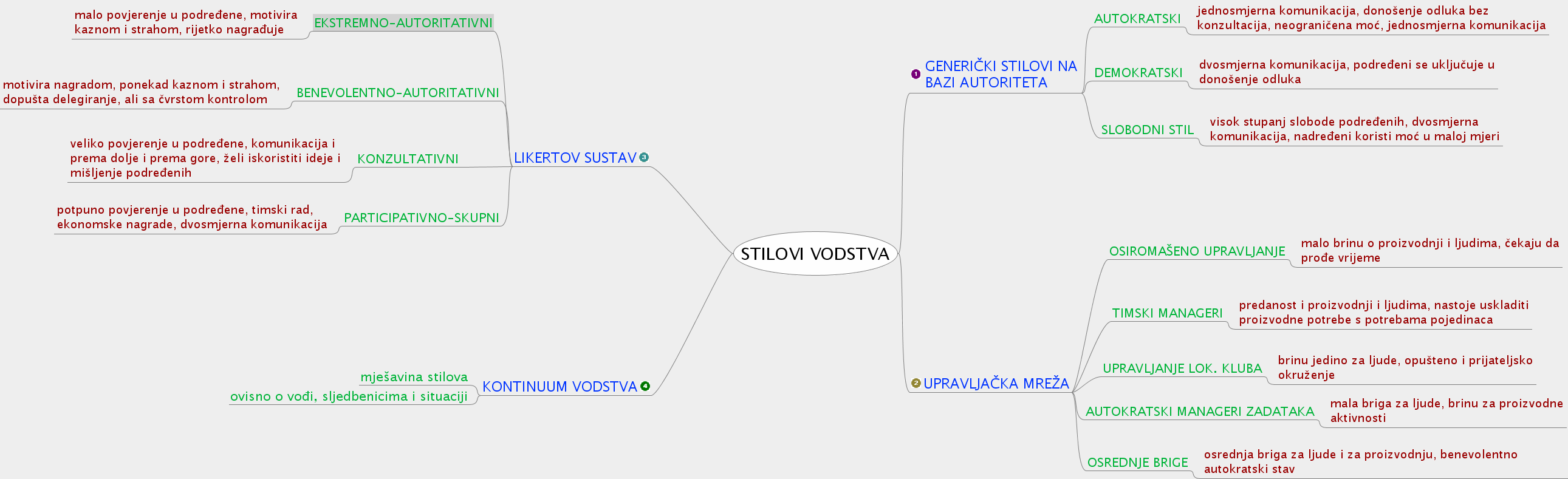 Stilovi vođstva